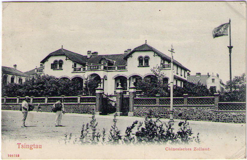 青岛胶海关早期建筑